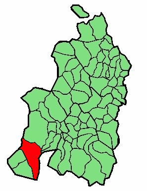 aipaturiko udalerriaren kokapena Nafarroa Beherean